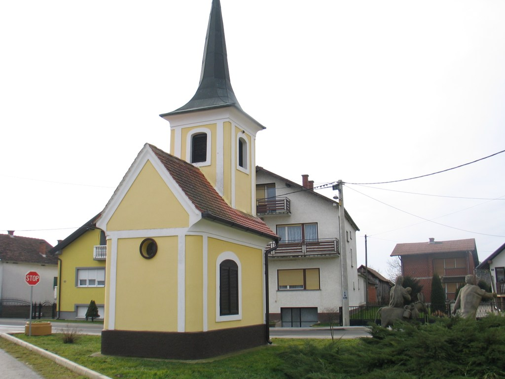 Donji Hrašćan 1